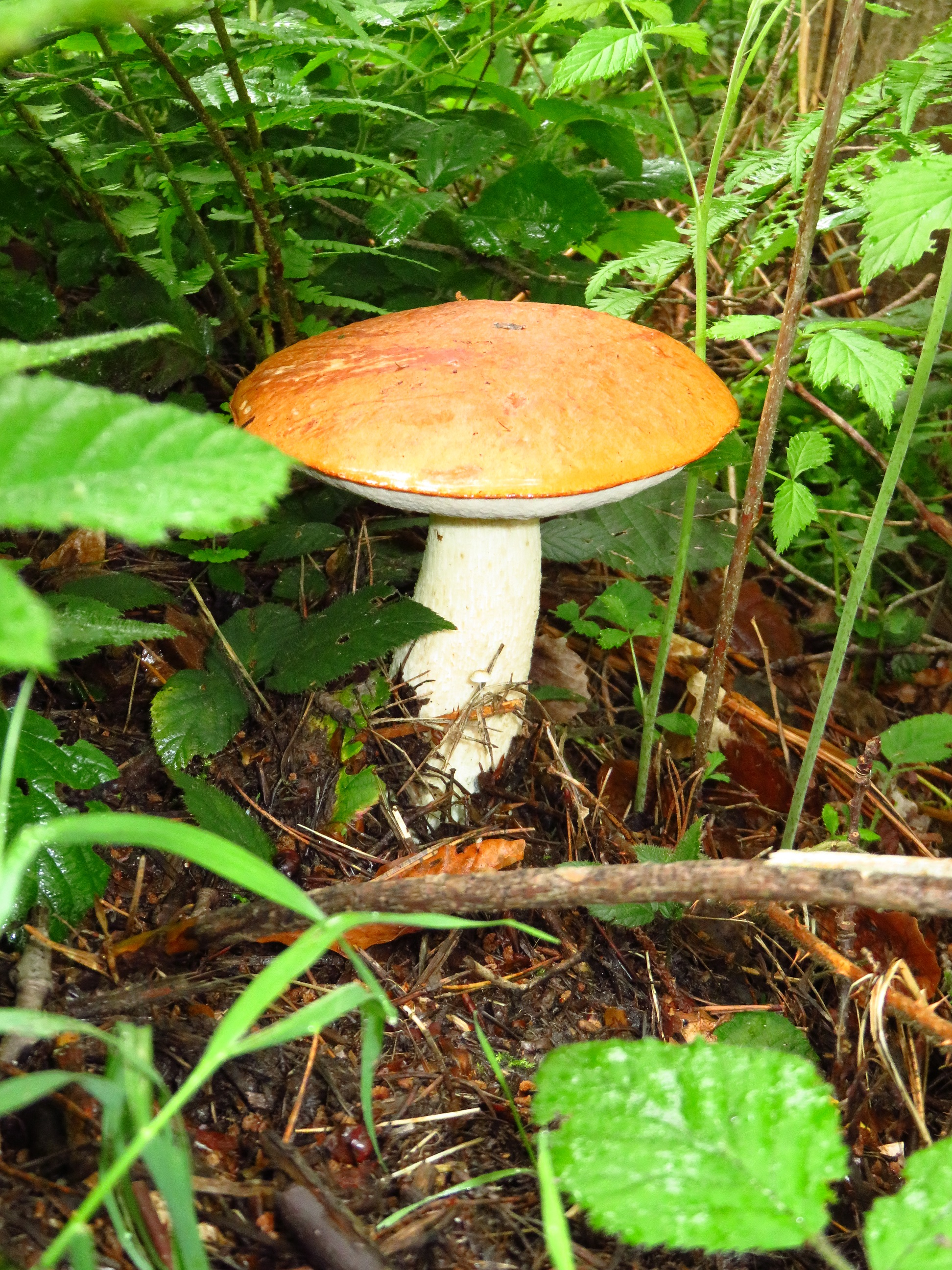 Im älteren Stadium werden Rotkappen über 20 cm groß.